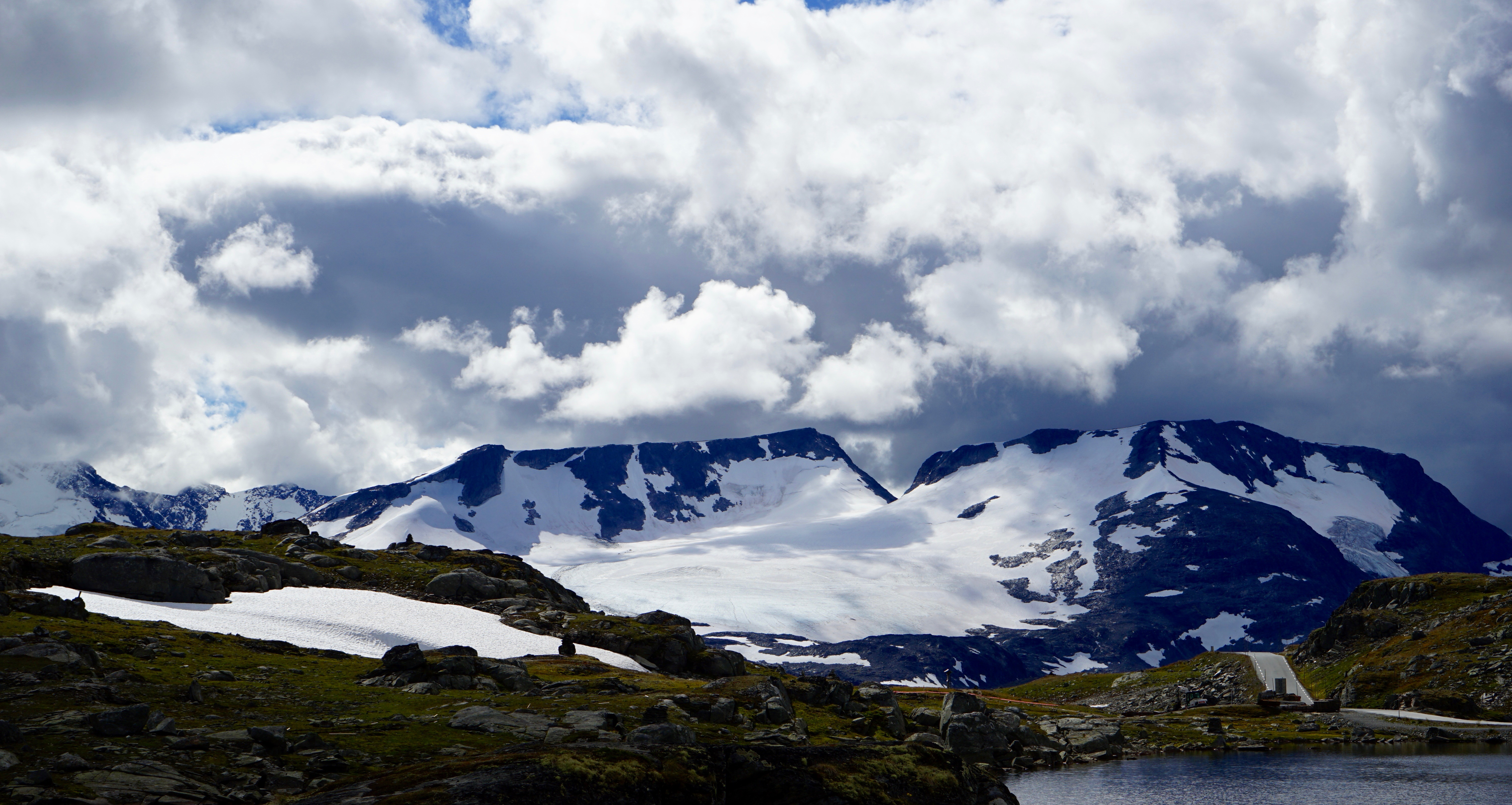 Bilde av Fannaråki fra Sognefjellet - Bilde av Christer Gundersen